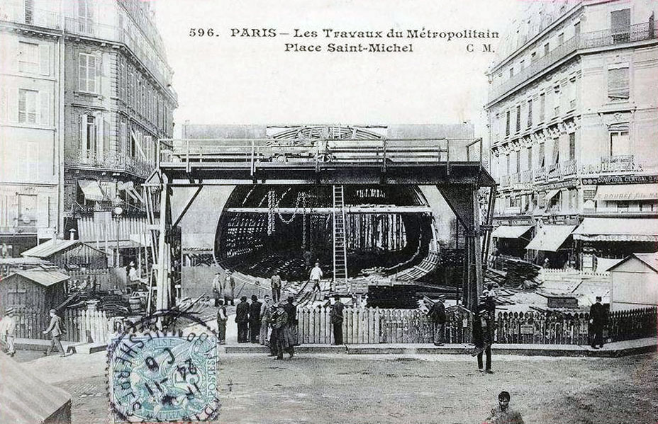 Carte postale ancienne éditée par CM, n°596 :PARIS - Les travaux du Metropolitain place Saint-MichelStation Saint-Michel - Ligne 4 du métro de Paris